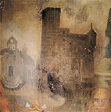 Darstellung der Burg Montréal, Ardèche, auf einem Gemälde aus der Zeit um 1742